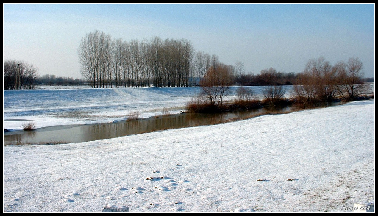 Nagyhódos, 4977 Hungary